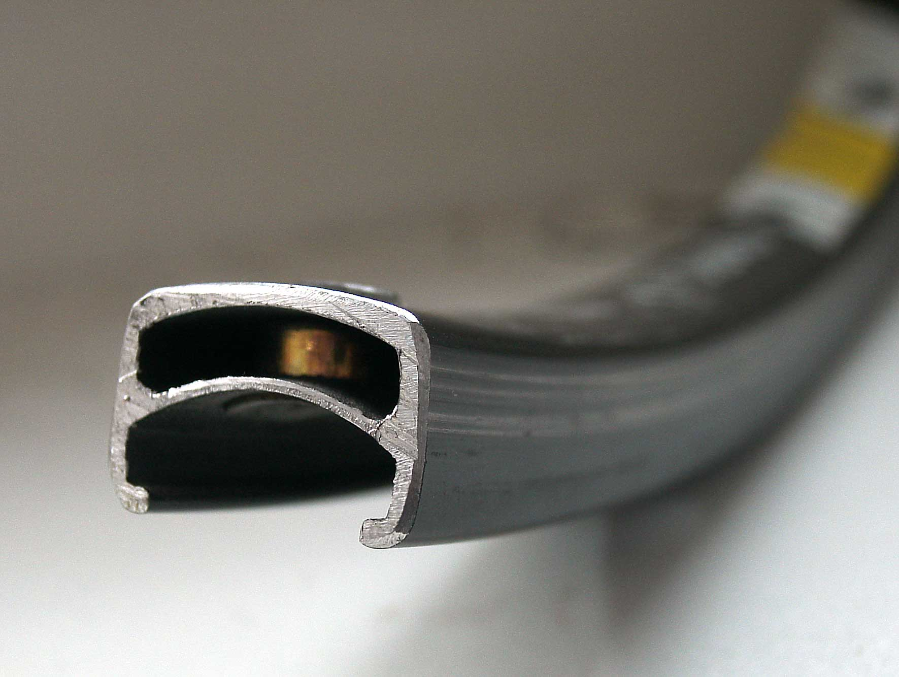 Querschnitt einer Fahrradfelge